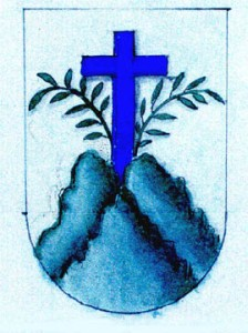 Escudo de la Orden de Monte Oliveto, dibujado en 1605 en Insegne di varii prencipi et case illustri d'Italia e altre provincie (Módena, 1605)